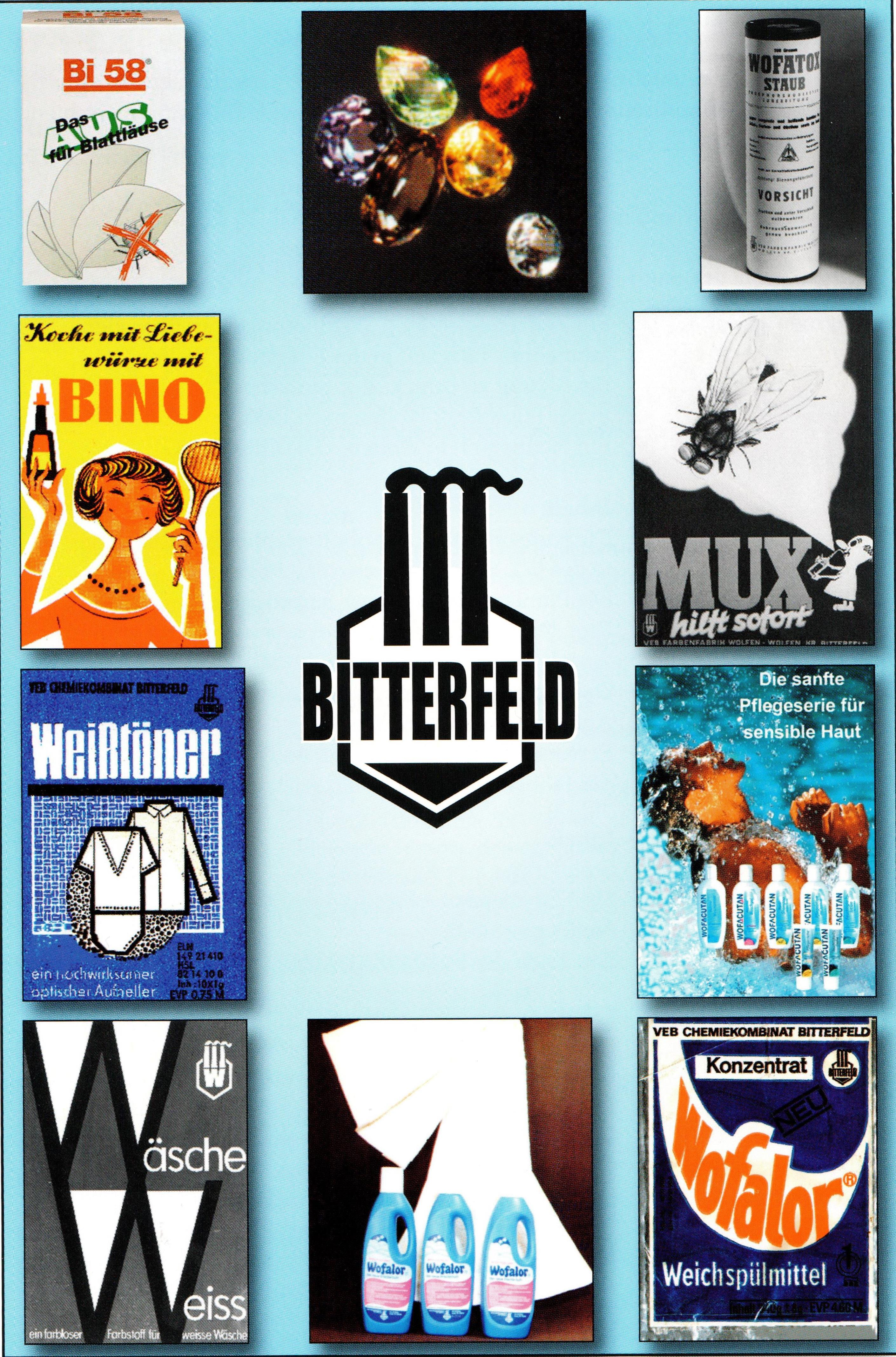 Auswahl einiger Konsumgüter aus dem VEB CKB